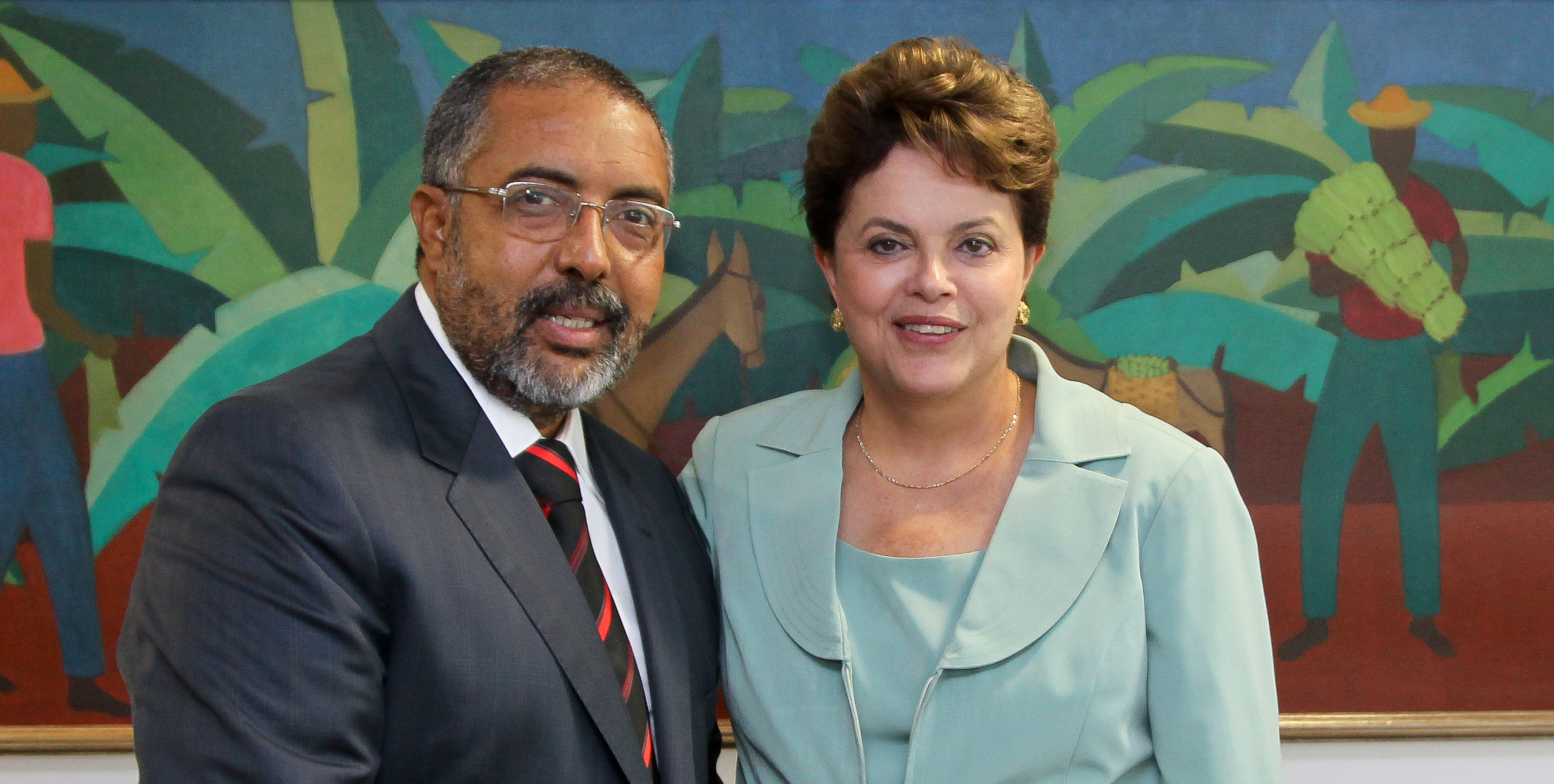 Brasíila - DF, 23/02/2011. Presidenta Dilma Rousseff recebe o senador Paulo Paim. Foto: Roberto Stuckert Filho/PR